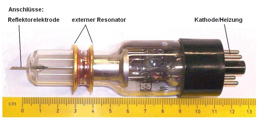 Reflexklystron Typ K-11 (Sowjetunion 1963), Bauform für externen Resonator andere Versionen